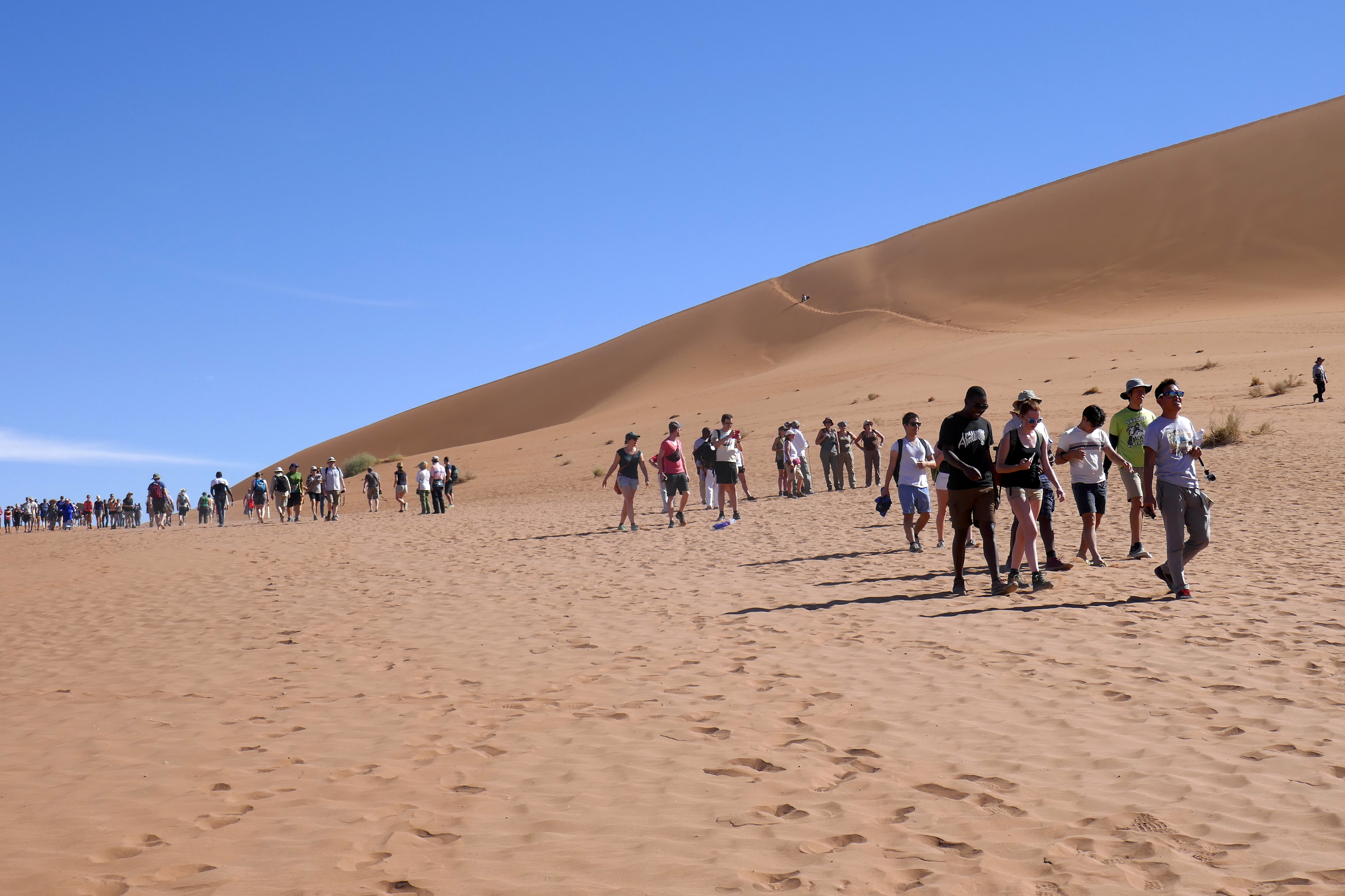 Tourisme de masse sur les dunes de Sossusvlei (désert du Namib, Namibie).